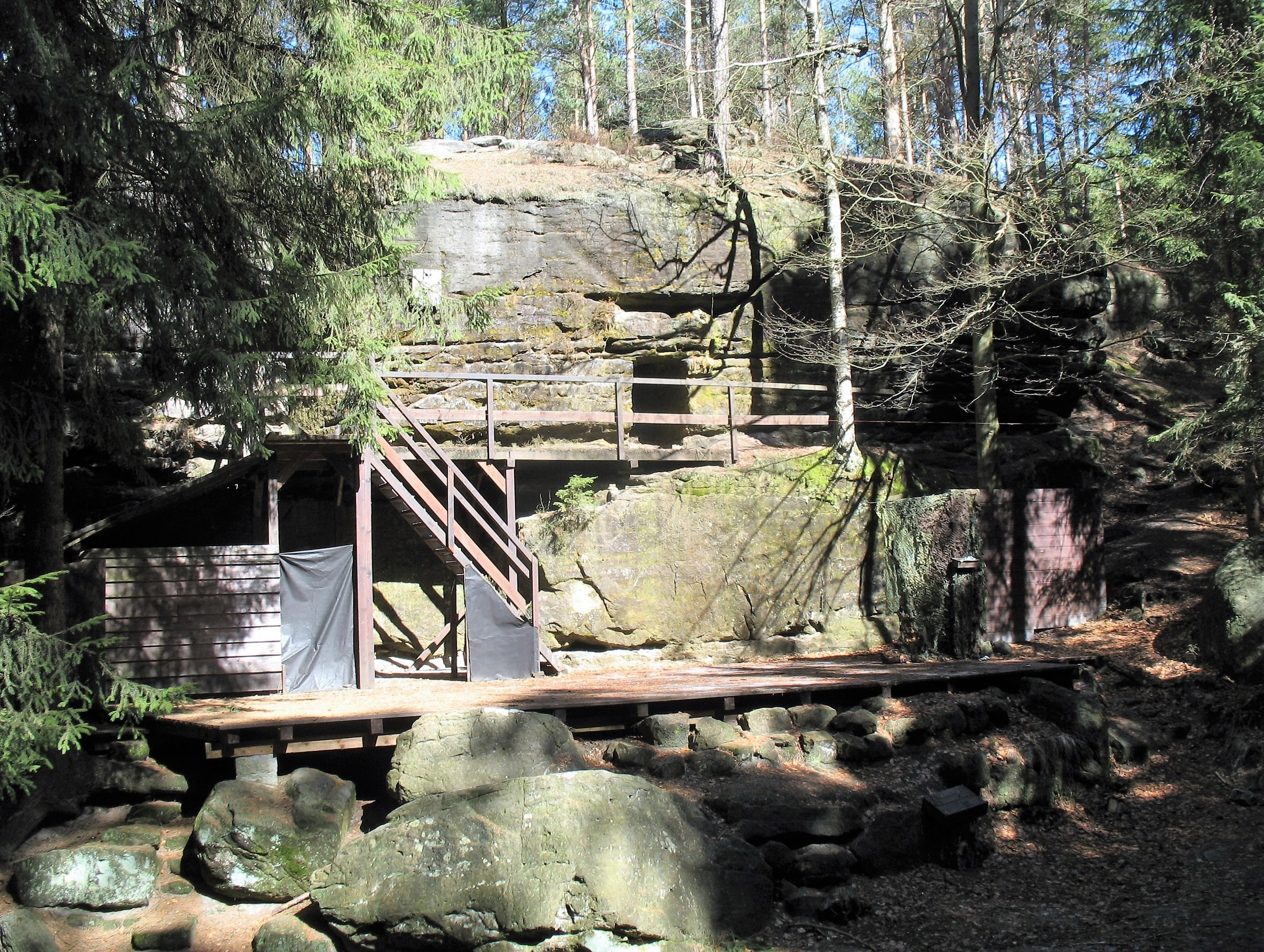 Lesní divadlo na katastrálním území Kytlické Mlýny, obec Kytlice, okres Děčín, Ústecký kraj